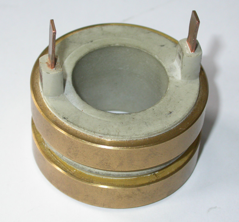 Schleifring